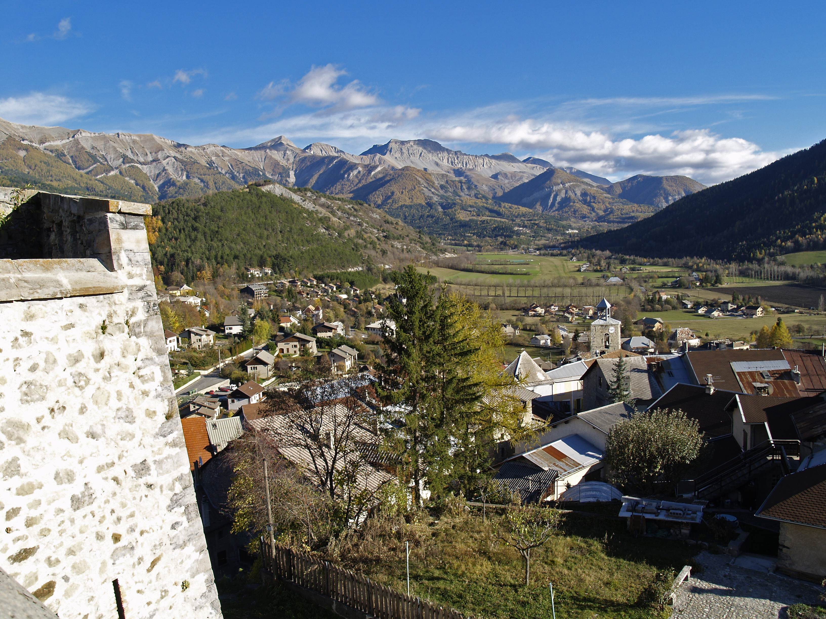 Auteur : GABILLET Jean-Claude